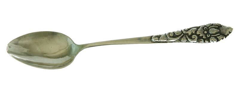 Servies (onderdeel). De zilverwerkplaats van Sastro Sarjono (SS) is gevestigd in Kota Gede, een stad van zilversmeden bij Yogyakarta. De werkplaats bestaat nog (2005).. Zilveren theelepel behorende bij een theeservies